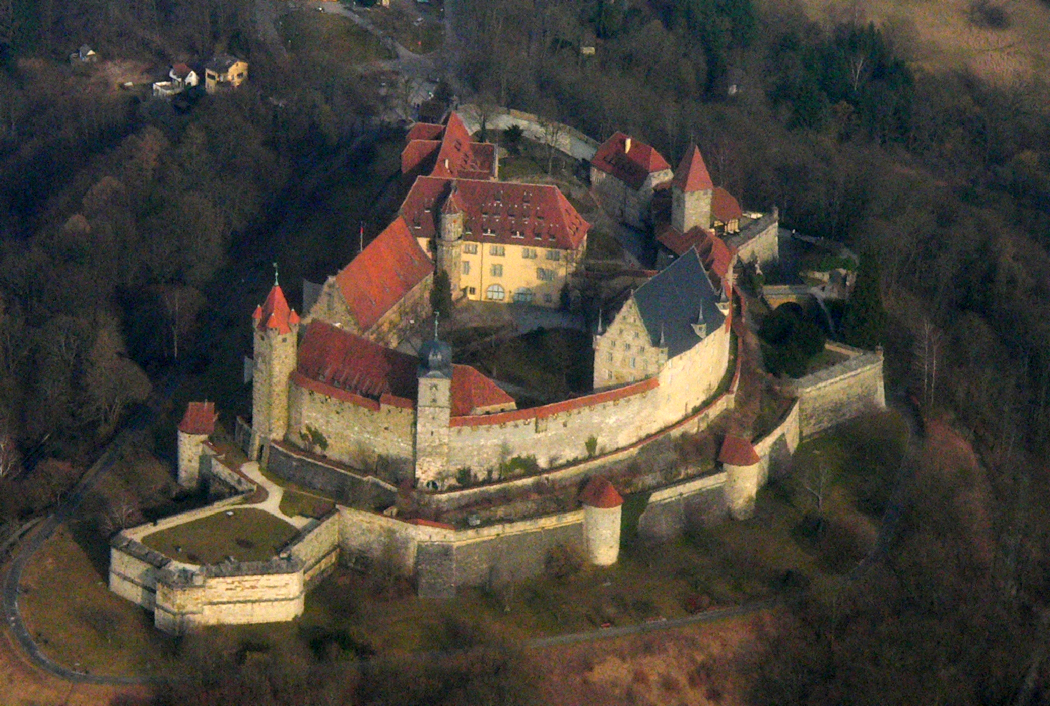 Veste Coburg, Oberfranken, Bayern